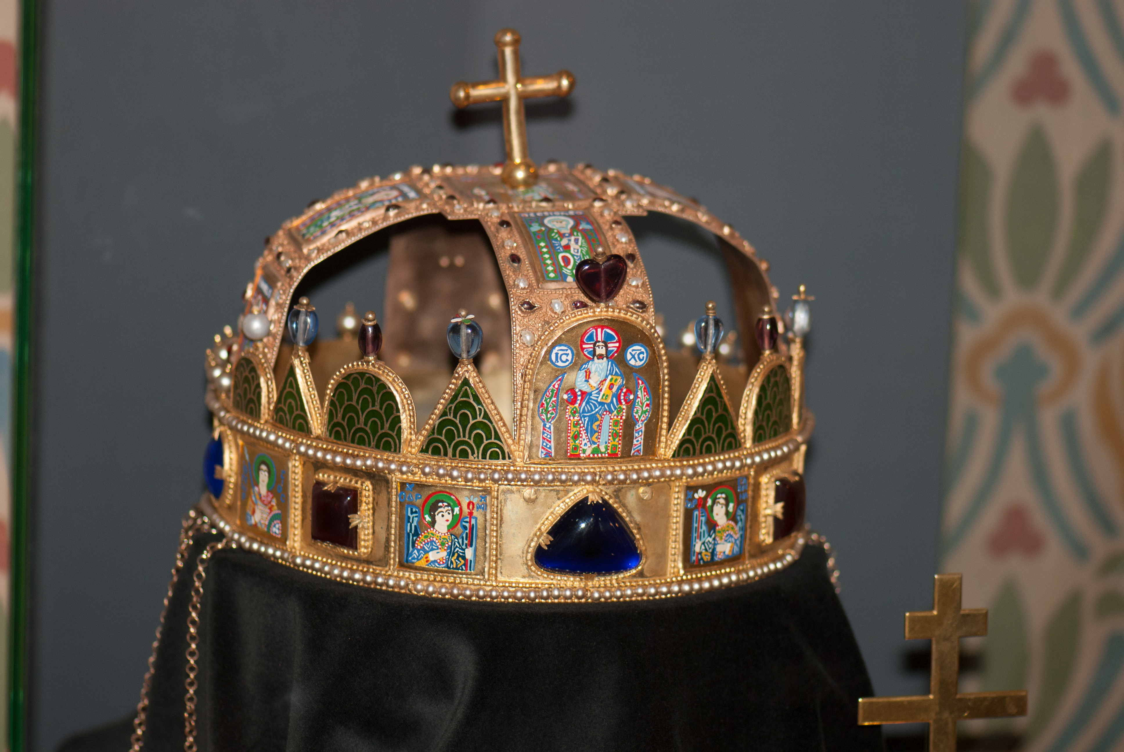 Budapest 2012